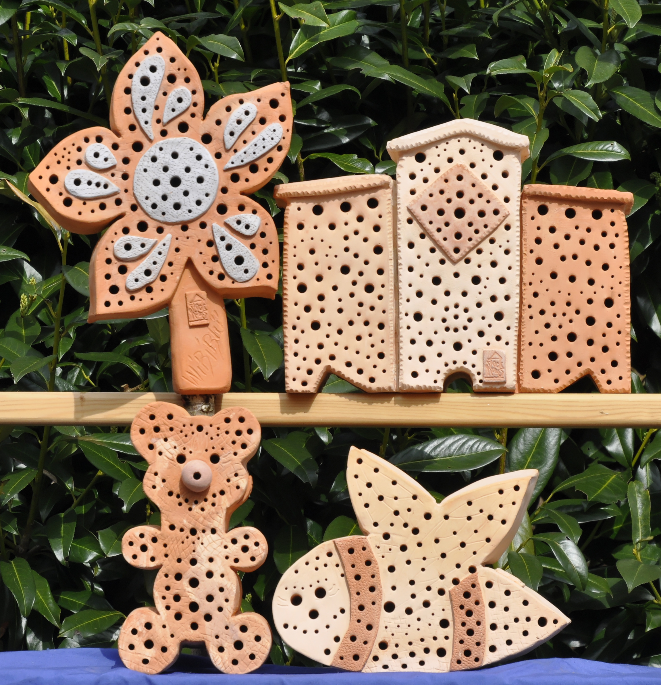 Nisthilfe aus gebranntem Ton WildBienenBienchen, WildBienenBärchen, WildBienenStreet und WildBienenBlüte von Barbara Stockhaus